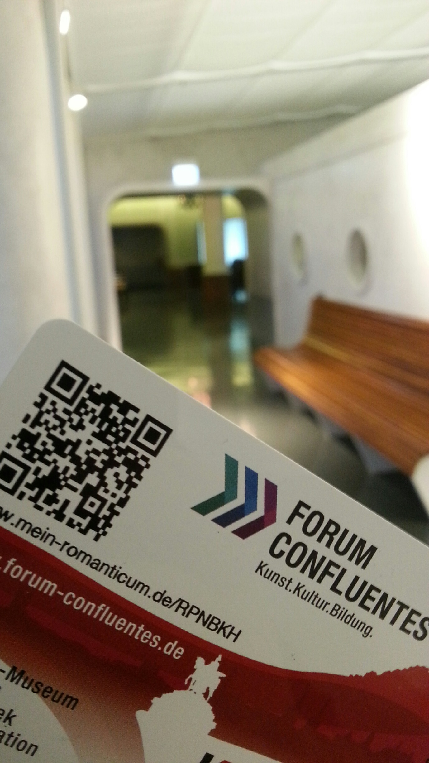 Innovative Eintrittskarte des Romanticum Koblenz